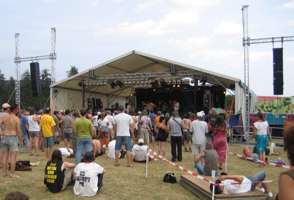 Die Hauptbühne des Burg Herzberg Festivals